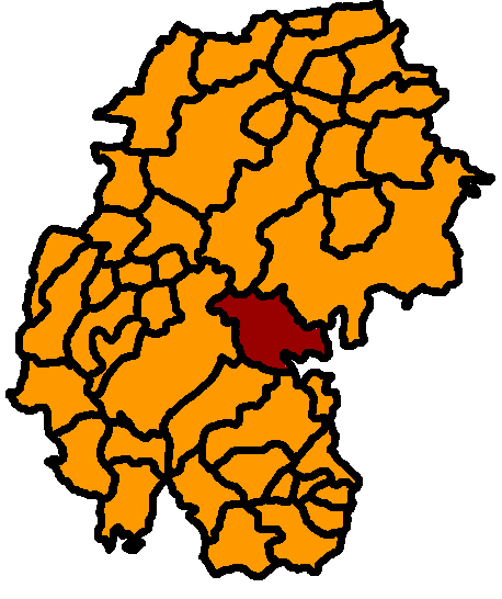 Wolfsberg hervorgehoben, Ilm-Kreis